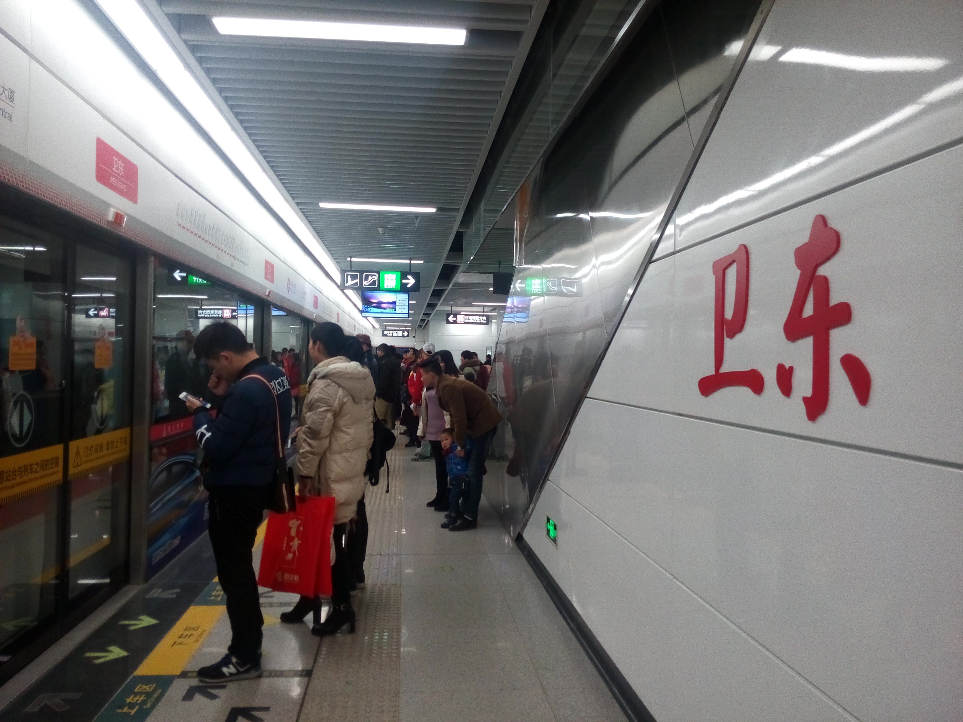 卫东站站台 瑶湖西方向